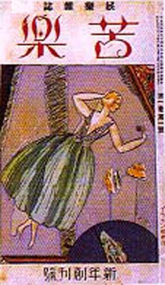 Kuraku Jan 1 1924 cover (『苦楽』創刊号表紙)